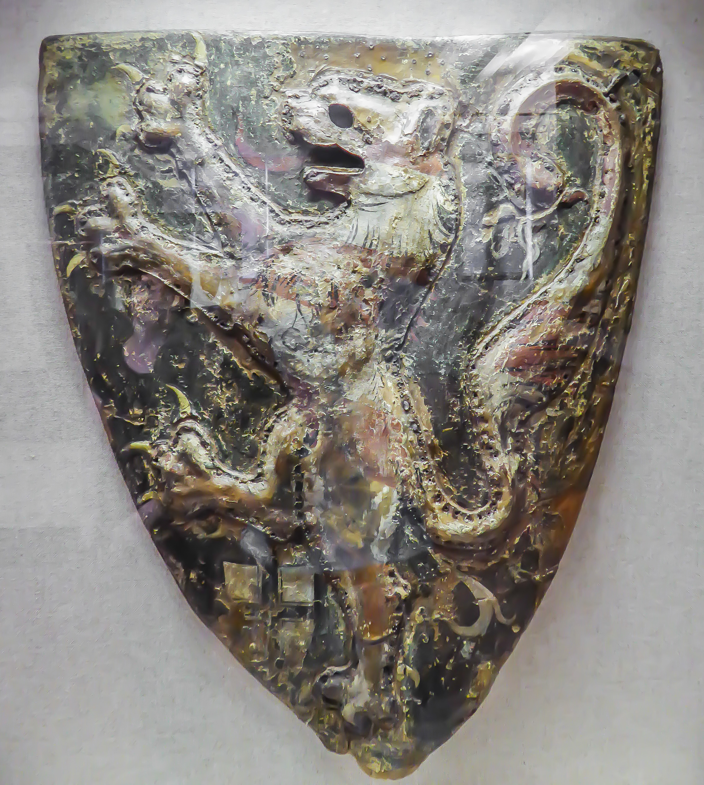 Schild des Landgrafen Konrad von Thüringen, ausgestellt im Marburger Schloss Thüringen/Hessen, um 1230/1240 Zu Details des Objekts siehe Schild des Landgrafen Konrad von Thüringen auf bildindex.de